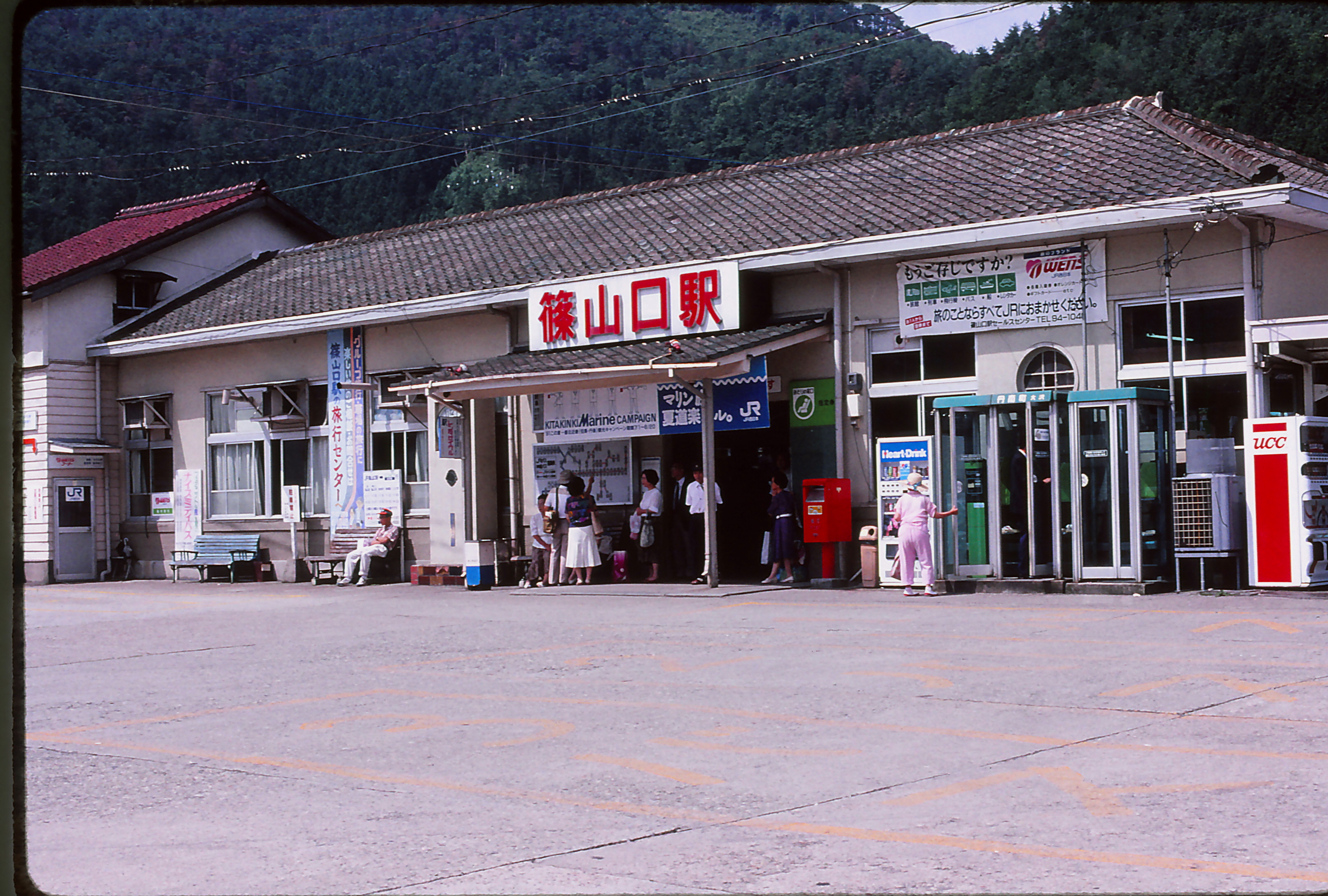 地上駅舎時代の篠山口駅